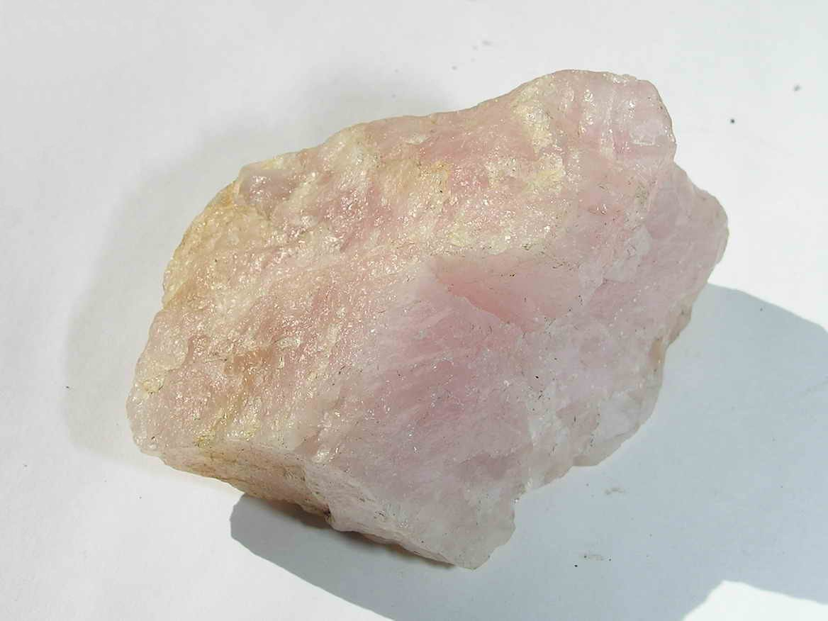 cuarzo